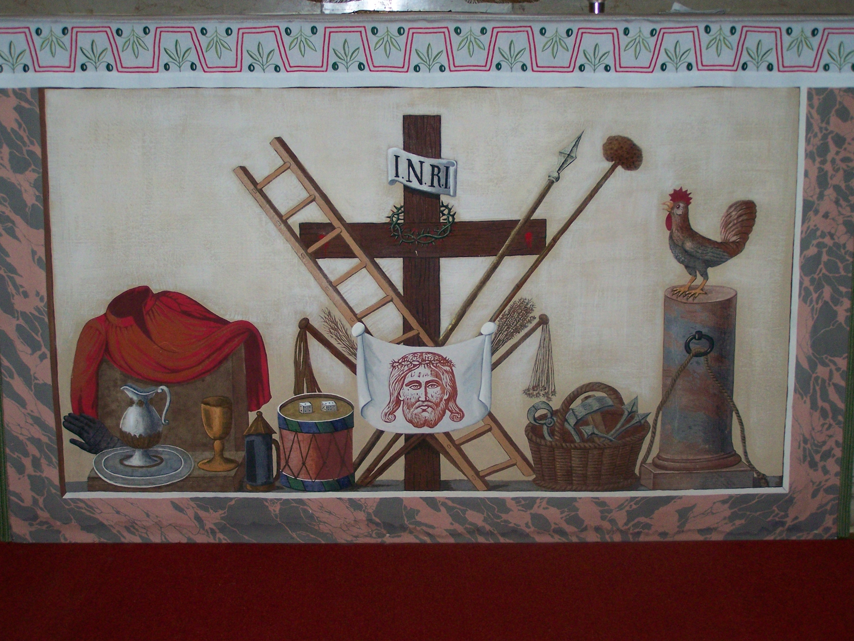 Paliotto con gli strumenti della passione di Cristo conservato presso la chiesa inferiore del Santuario Arcivescovile della Beata Vergine dei Miracoli di Corbetta (MI) - Italy